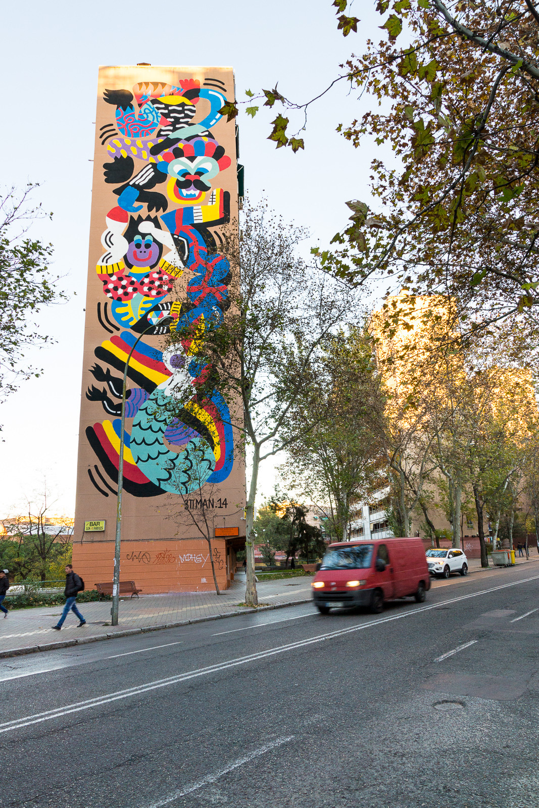 Murales de Invierno - II - 59